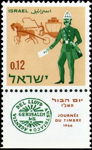 יום הבול - דוור אוסטרי וכרכרה